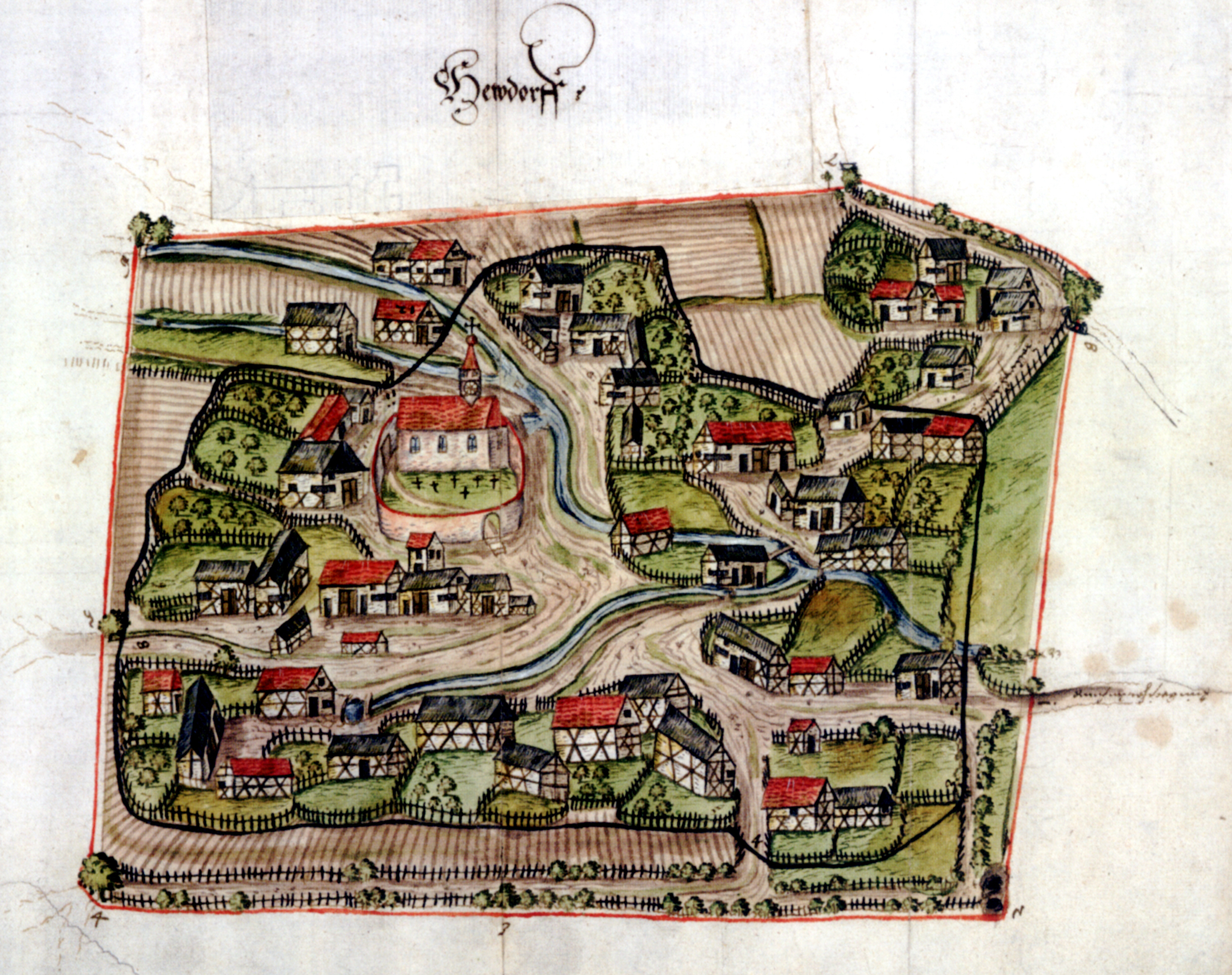 Ansicht des Dorfes Heudorf bei Meßkirch (heute Ortsteil von Meßkirch); nördlicher Bodeseeraum, kolorierte Pinselzeichnung auf Papier, um 1575; Karlsruhe, Generallandesarchiv, J/B Heudorf 1; typisches Haufendorf des Spätmittelalters/der frühen Neuzeit.